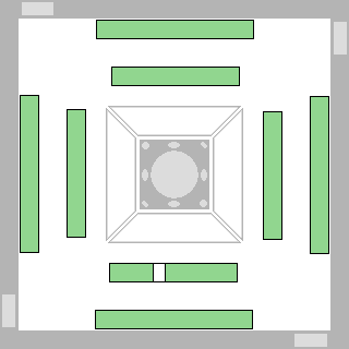 配牌完了型全自動卓における配牌の図